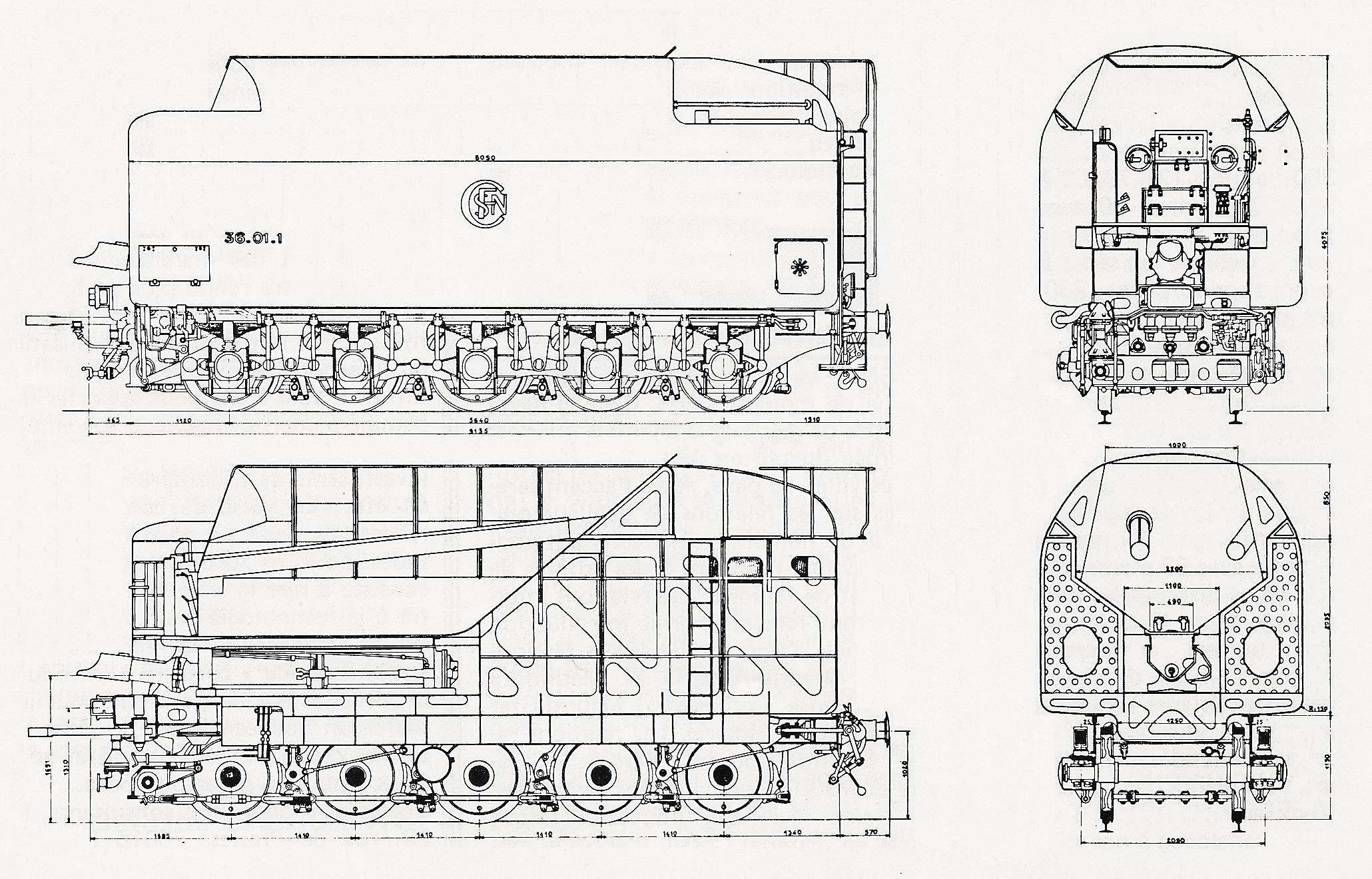 Dessin d'époque du tender à cinq essieux accouplé aux locomotives étudiées par la DEL.